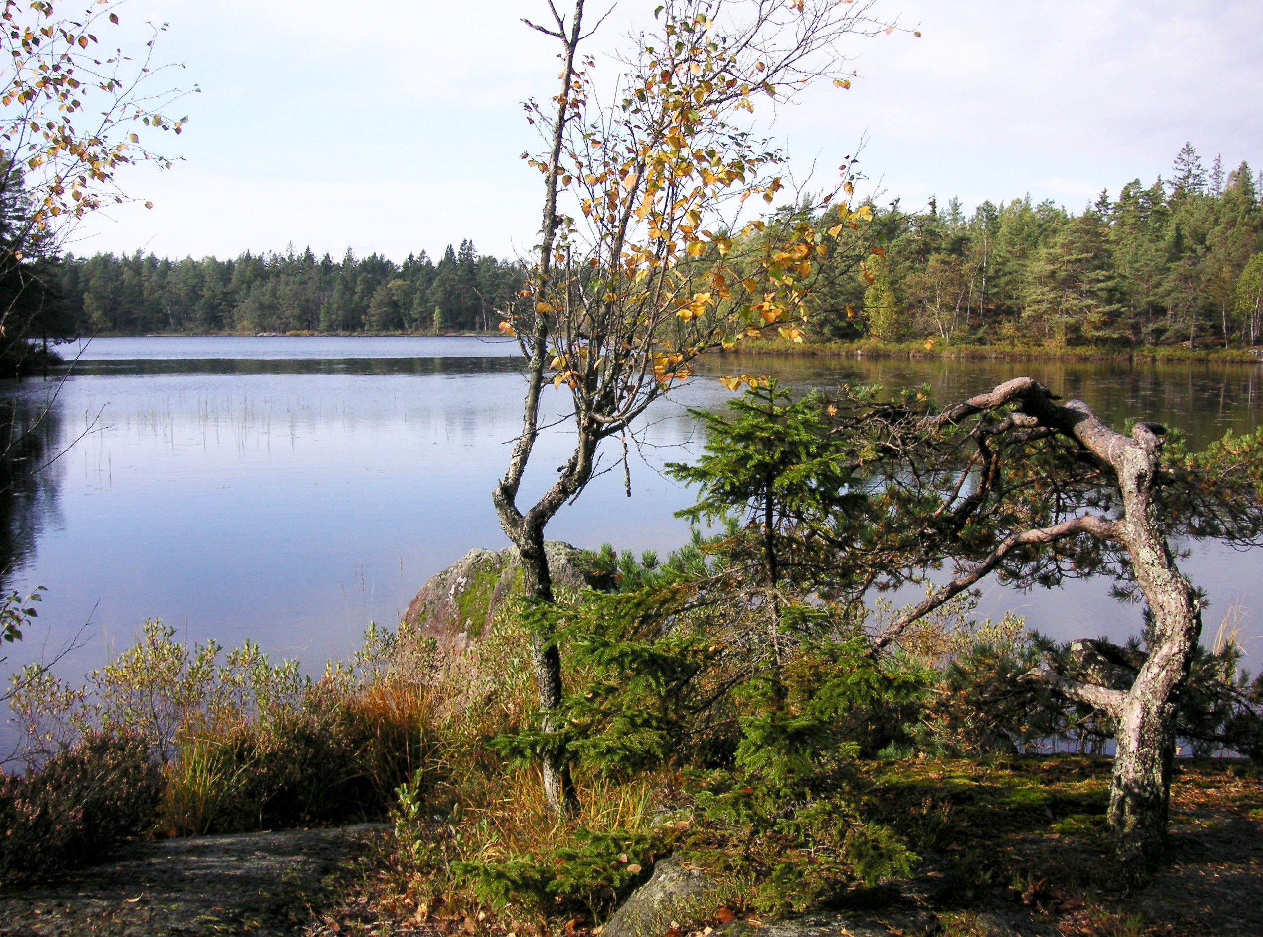 Trehötningen i Paradisets naturreservat, Hanveden